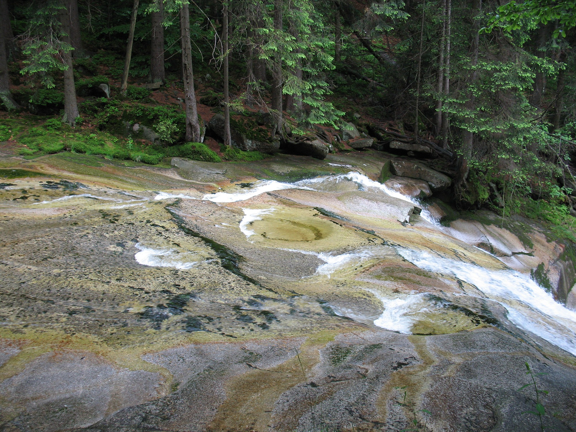 Obří hrnce u Mumlavského vodopádu